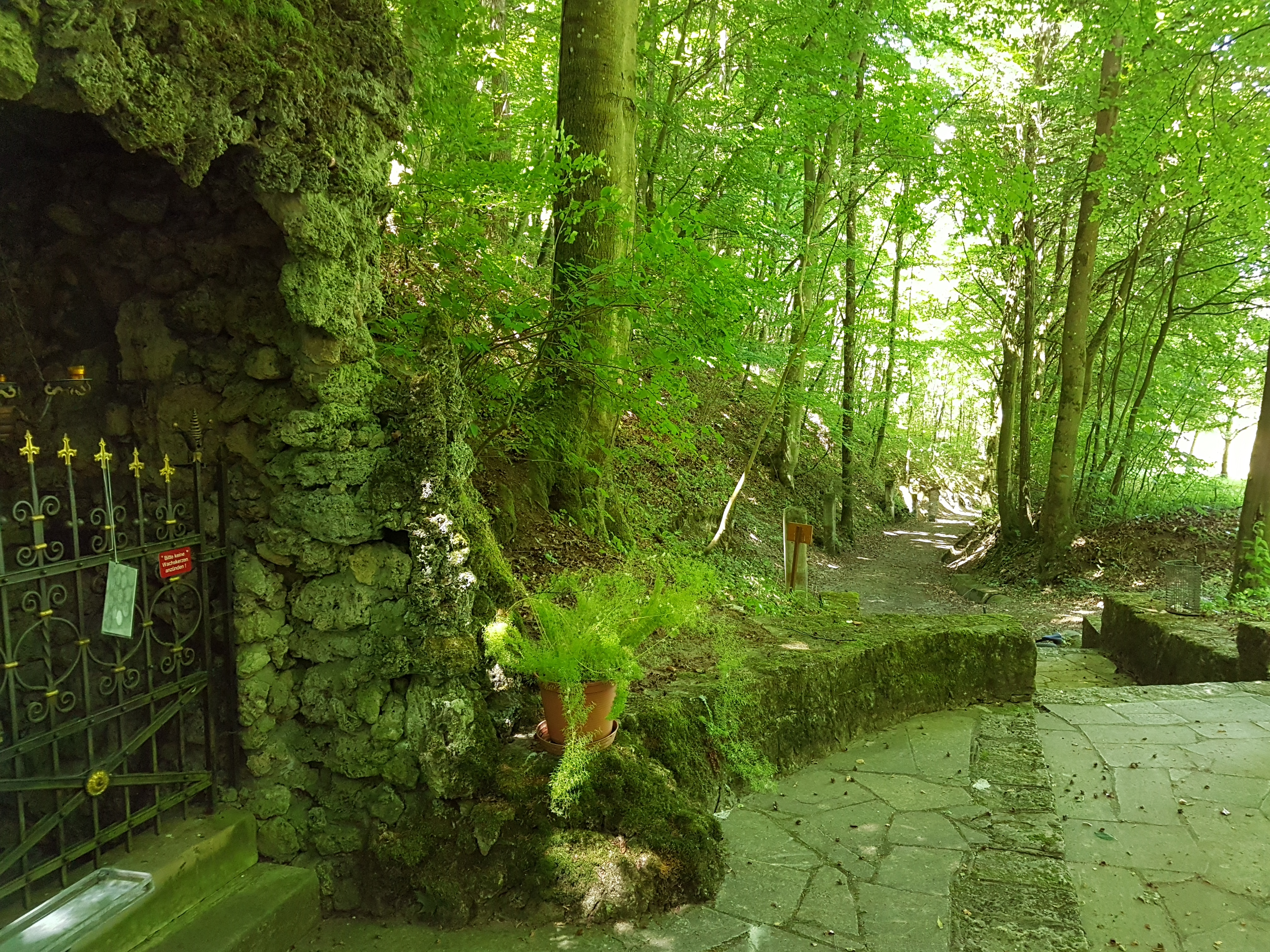 Die Mariengrotte (auch Lourdesgrotte genannt) in Oberlauda, einem Stadtteil von Lauda-Königshofen im Main-Tauber-Kreis, wurde 1905 errichtet. Im Jahre 1905 entstand durch die Initiative von Justine und Bernhard Sack die Mariengrotte in Oberlauda. Seitdem sind die Grotte und der Kreuzweg, welcher zu ihr führt, ein beliebter Ort für Ausflüge und die Abhaltung von Gebeten geworden. Durch ehrenamtliche Unterstützung werden Grotte und Weg regelmäßig gepflegt und in Stand gehalten.